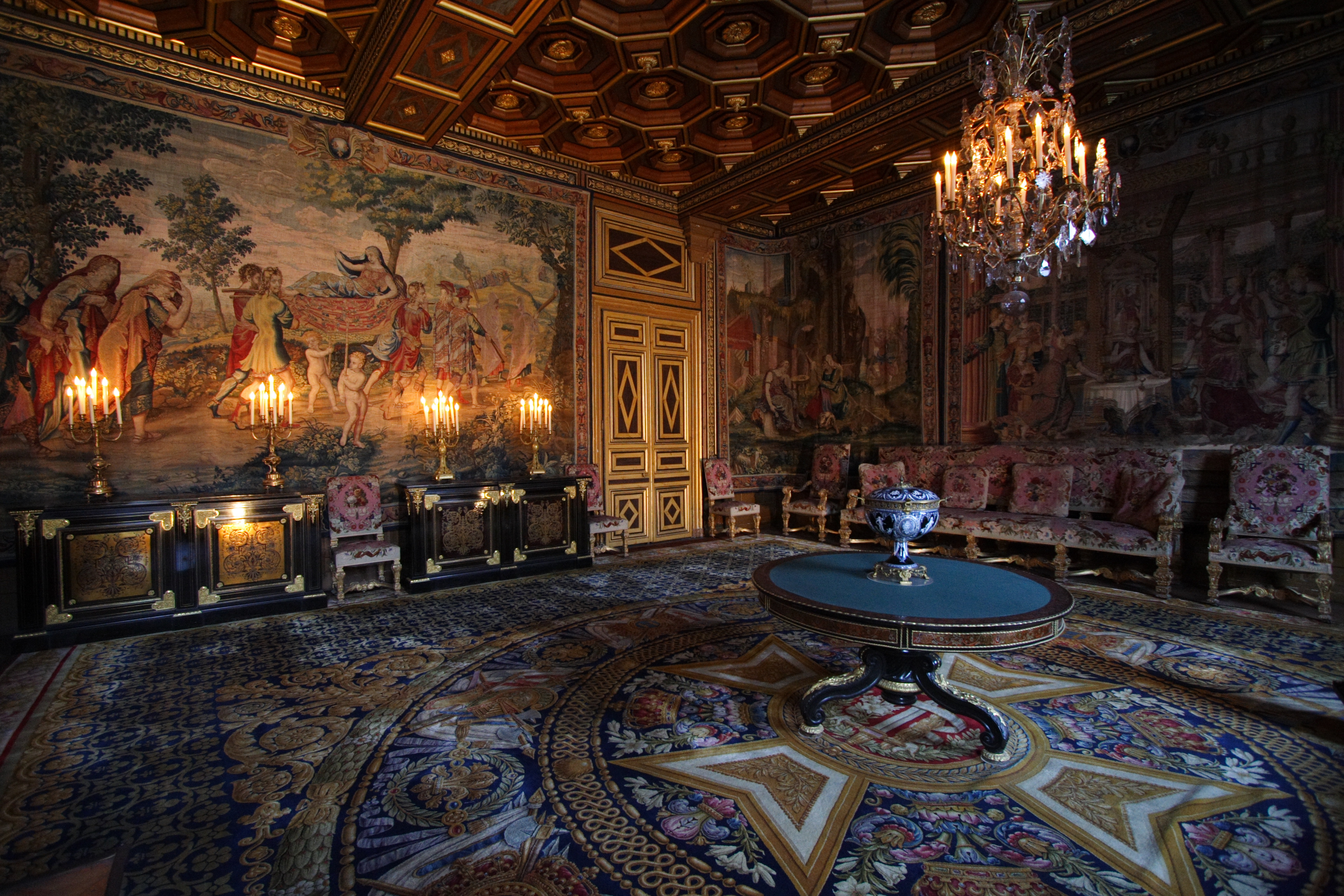 Der Tapisseriesalon im Schloss Fontainebleau